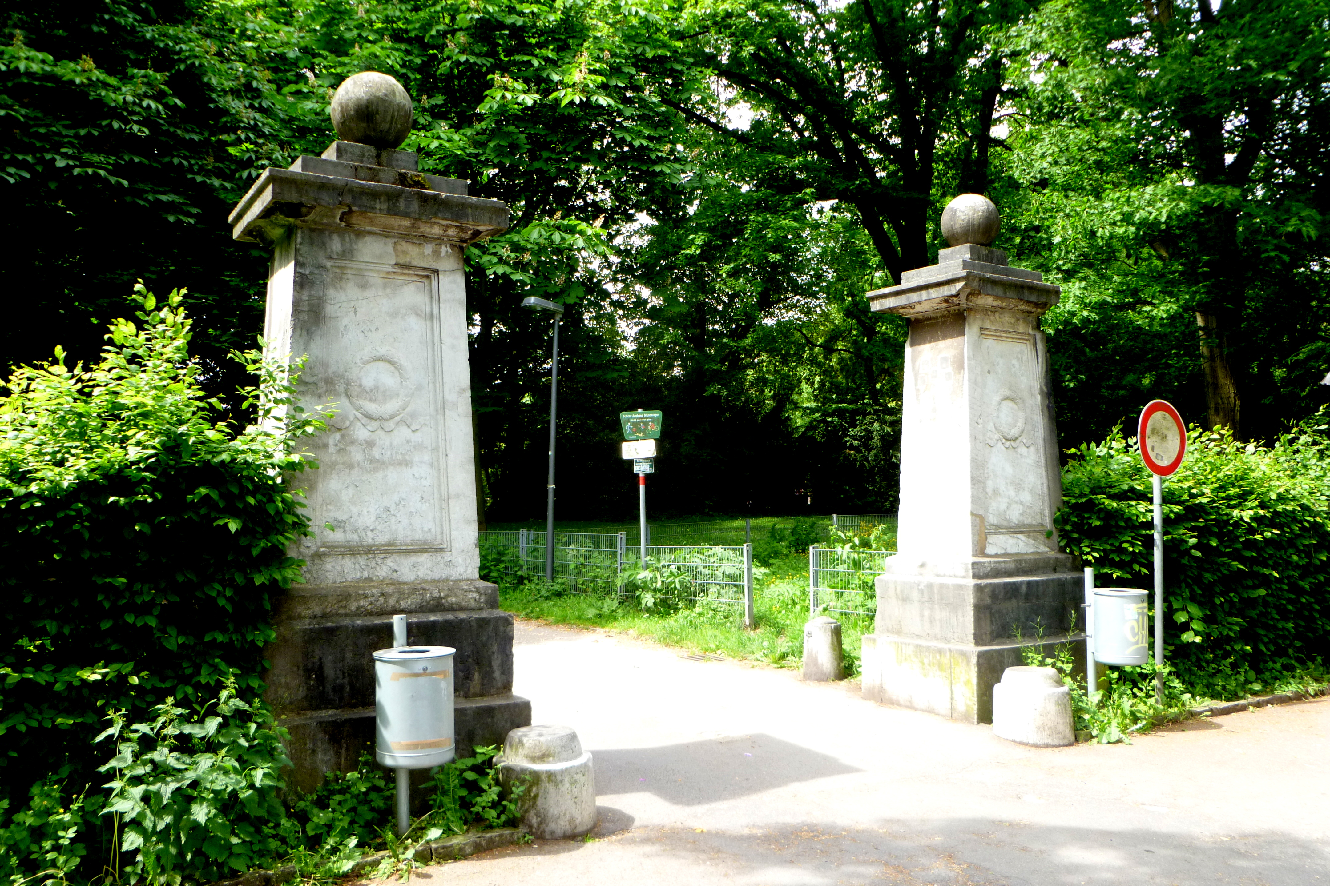 Eingangs-Spolien (Vorderseite) Hangeweiher, Aachen, transloziert vom Wachhaus Königstor, Architekt: Adam Franz Friedrich Leydel